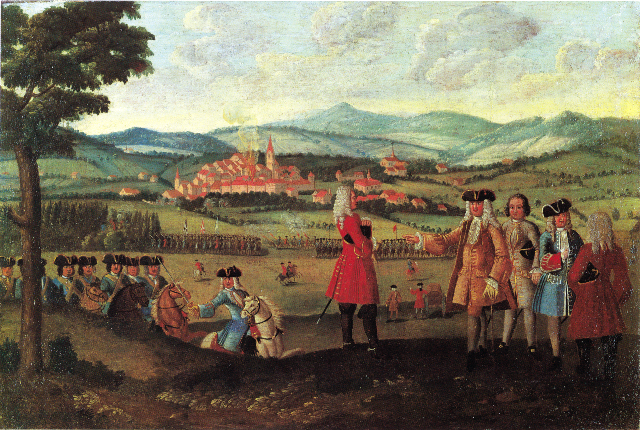 Die Beschiessung von Wil SG am Abend des 21. Mai 1712 während des 2. Villmergerkrieges (Truppen in Schlachtordnung vor der Stadt Wil, im Vordergrund verhandeln Offiziere über Kapitulation). Öl auf Leinwand. 65 x 91 cm. Schweizerisches Landesmuseum, Zürich, LM-1806.